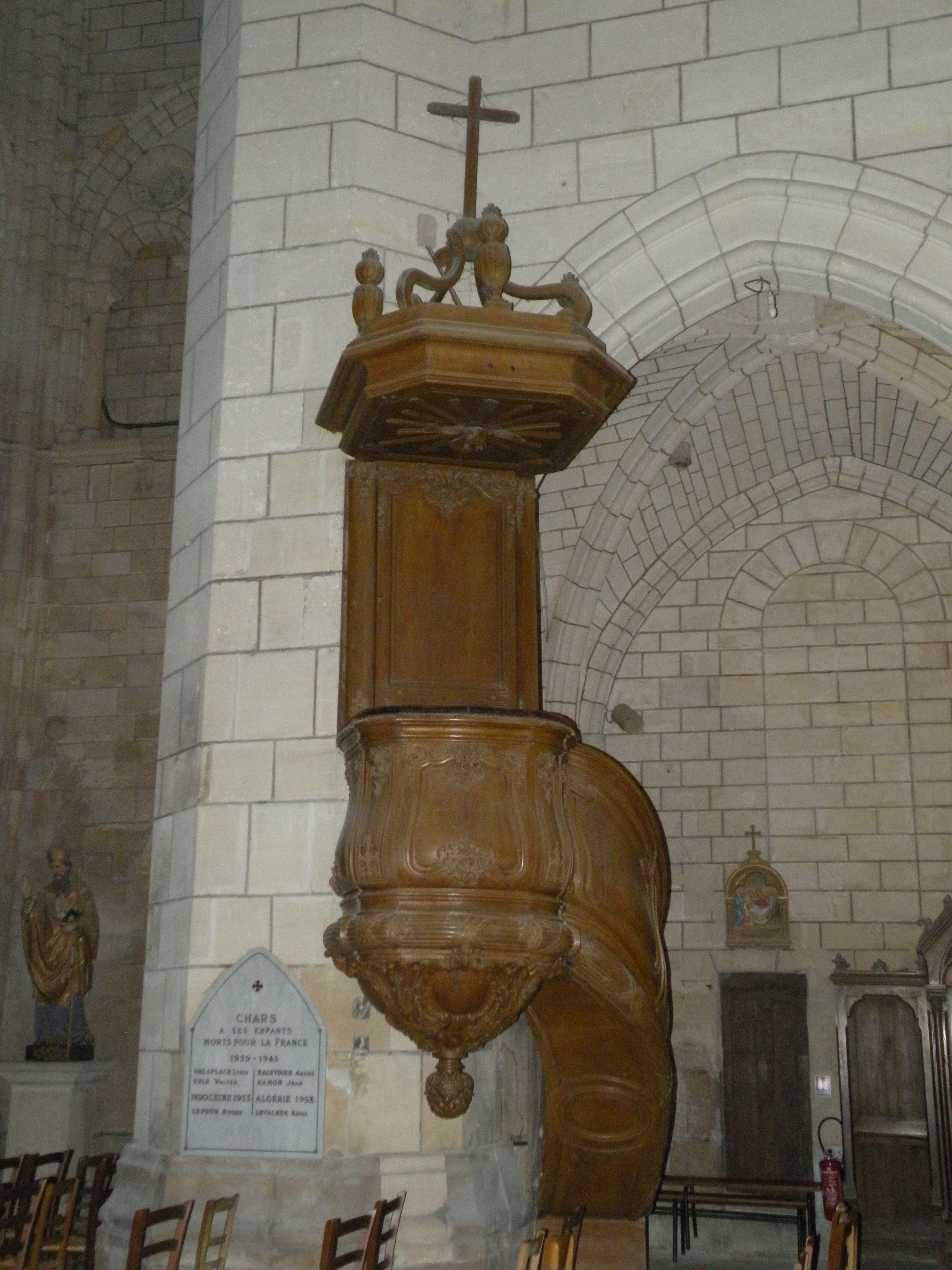 Chaire à prêcher du premier quart du XVIIIe siècle.